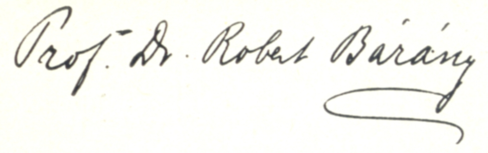 Signature of Robert Bárány (1876 Vienna - 1936 Uppsala)